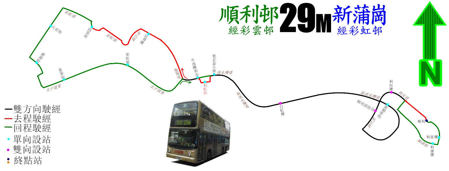 中文（香港）: 九巴29M線的走線圖